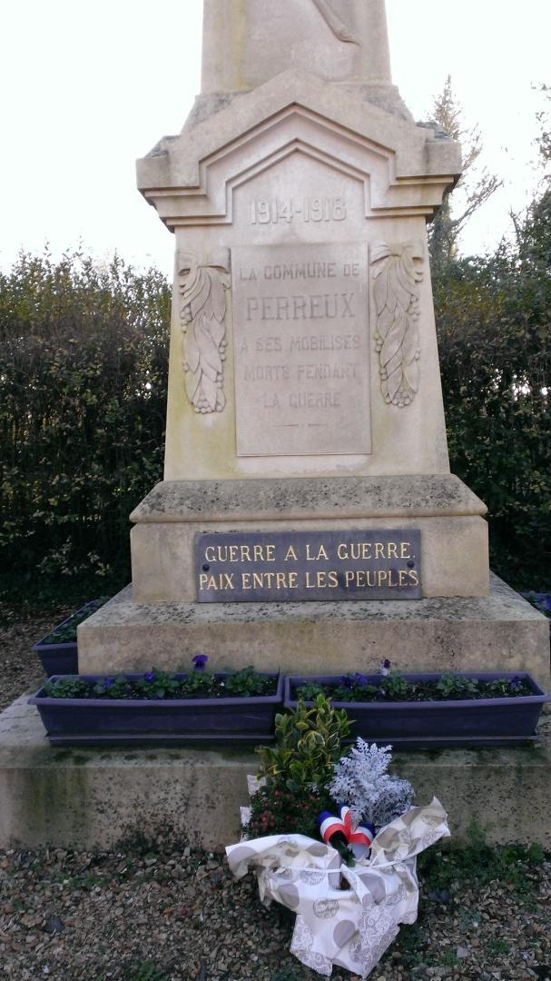 Monument aux morts pacifiste de Perreux, érigé en 1925, portant une plaque dorée avec la mention "Guerre à la guerre, paix entre les peuples"